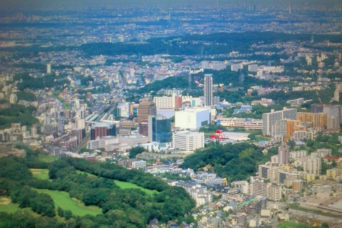 多摩ニュータウン、多摩センター駅周辺の空撮2012